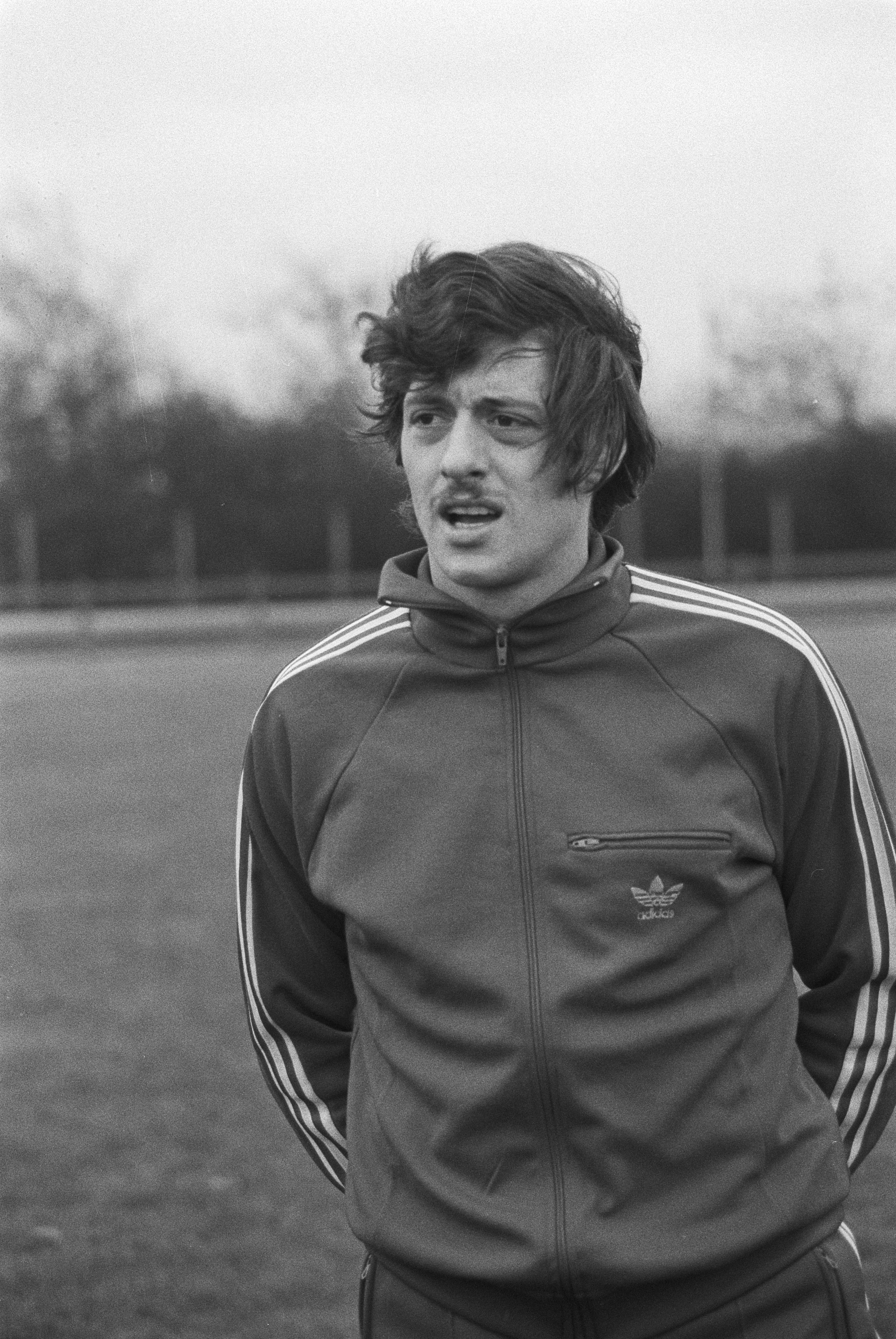 Collectie / Archief : Fotocollectie Anefo Reportage / Serie : [ onbekend ] Beschrijving : Training Belgisch nationale voetbalelftal in Mechelen voor de wedstrijd woensdag tegen Nederland (voorronde WK) 21 en 22 Van Moer , 23 en 24 Albert Cluytens Datum : 18 november 1980 Locatie : Mechelen Trefwoorden : Voetbal, sport Fotograaf : Dijk, Hans van / Anefo Auteursrechthebbende : Nationaal Archief Materiaalsoort : Negatief (zwart/wit) Nummer archiefinventaris : bekijk toegang 2.24.01.05 Bestanddeelnummer : 931-1529